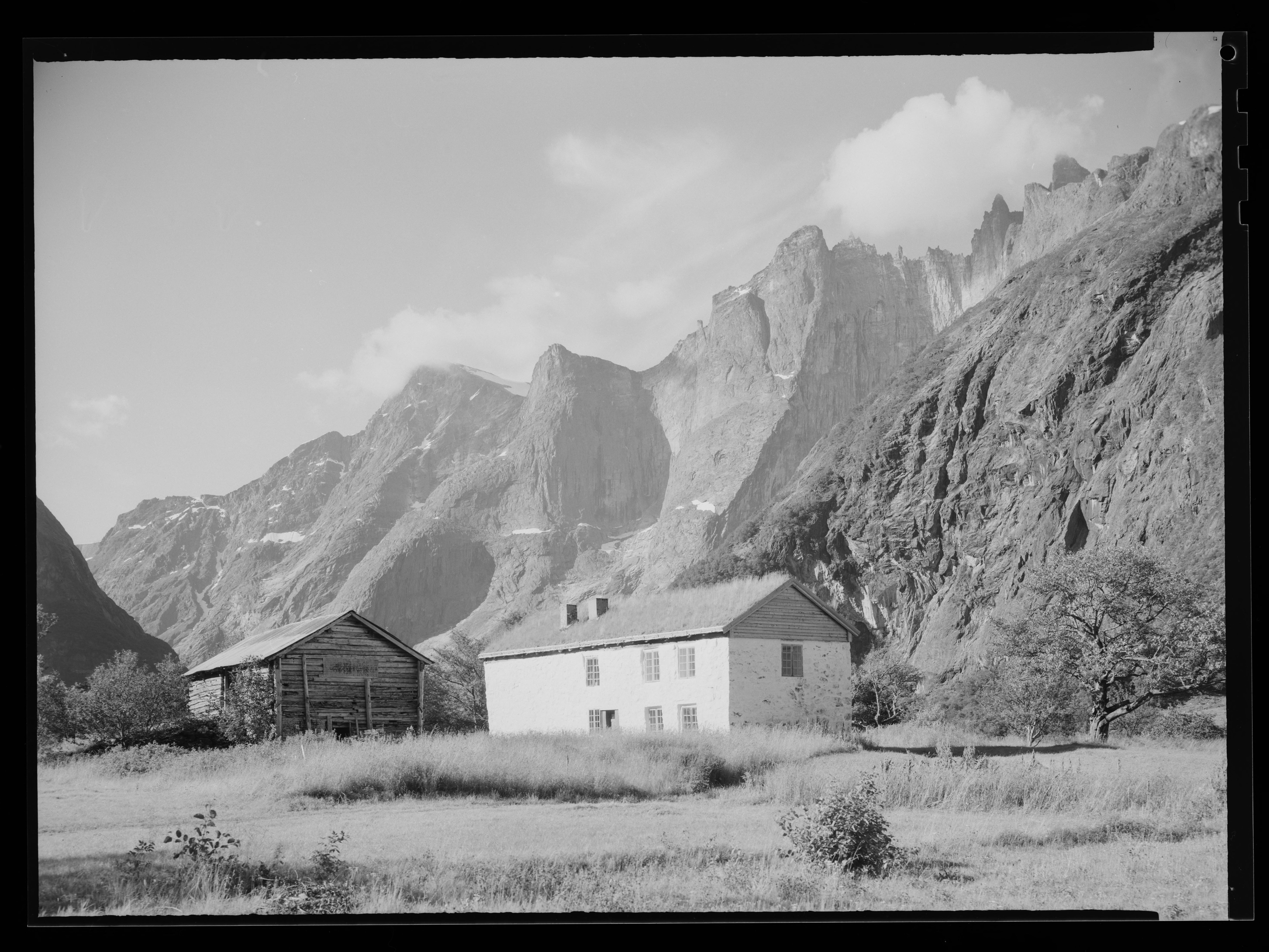 Bildet er hentet fra Nasjonalbibliotekets bildesamling Romsdalen,Trolltindan, Rauma, Møre og Romsdal